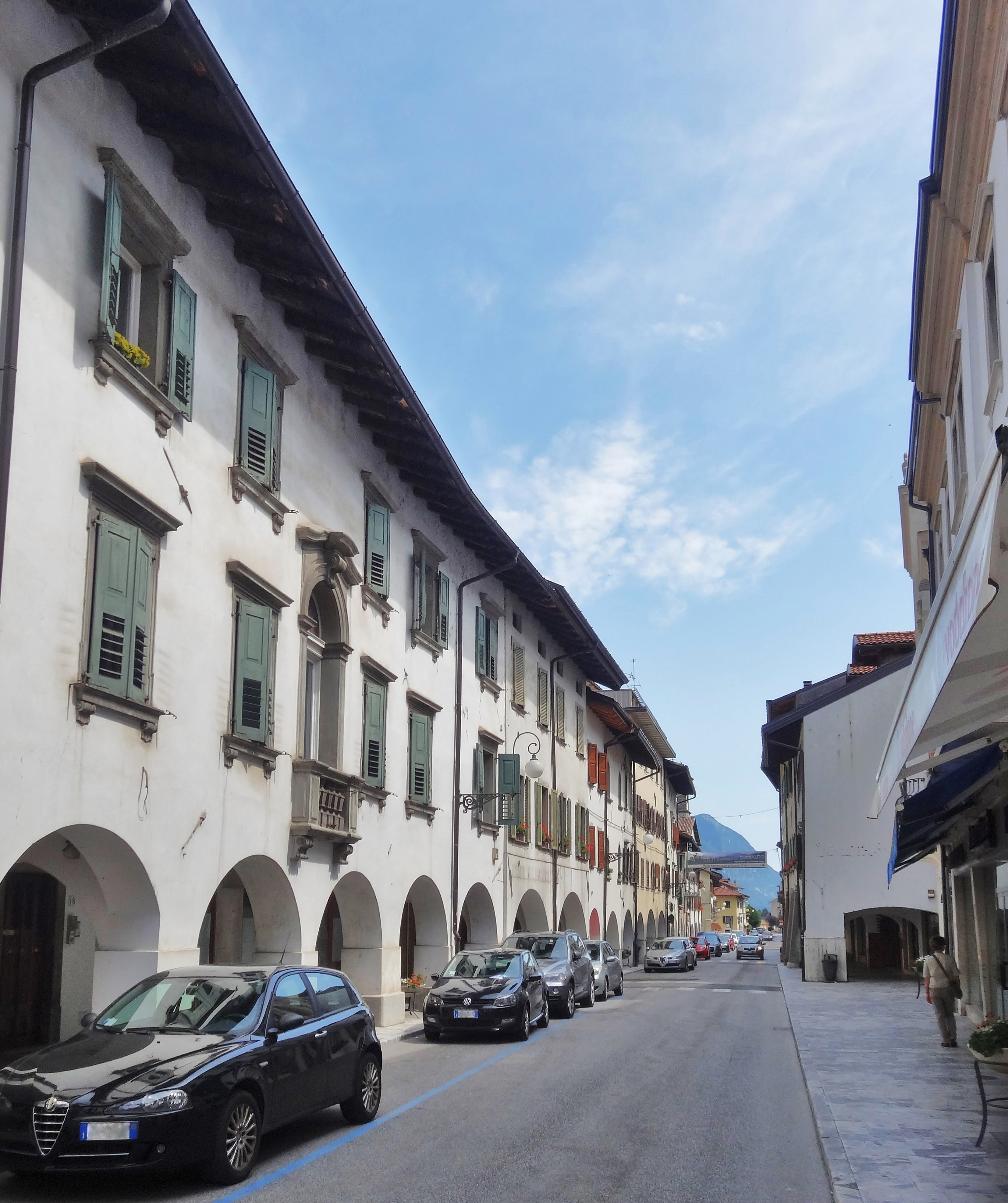 Straße in der Altstadt von Tolmezzo